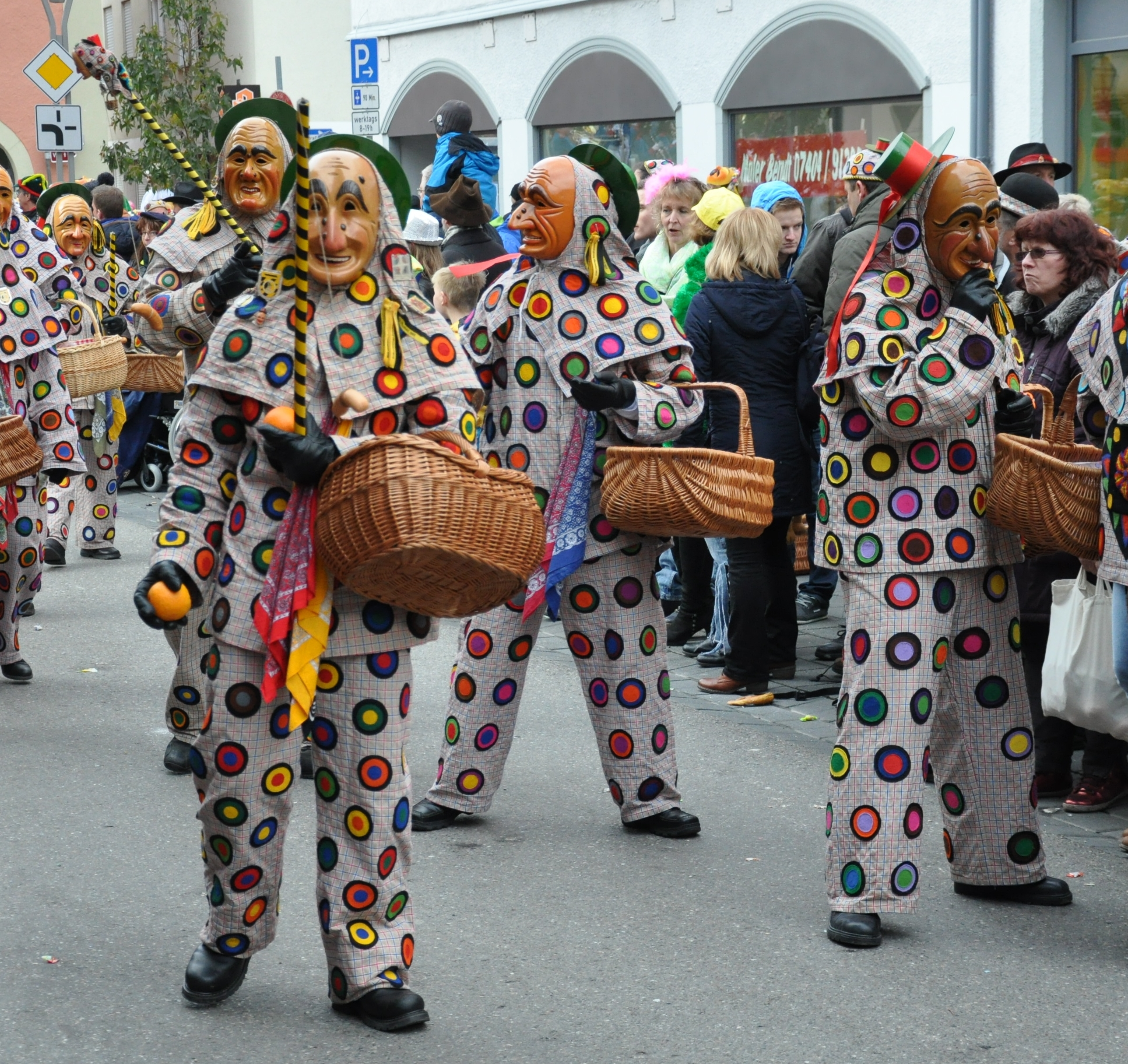 Oberndorf am Neckar, Narrensprung am Fasnetsdienstag nachmittag 2014, Schantle